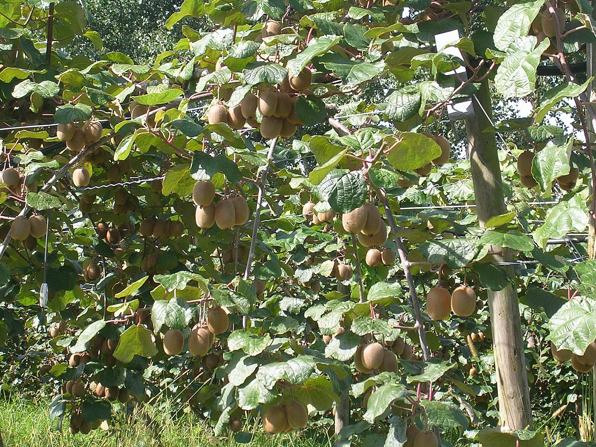 Kiwi de l'Adour à Aurice, dans le département français des Landes